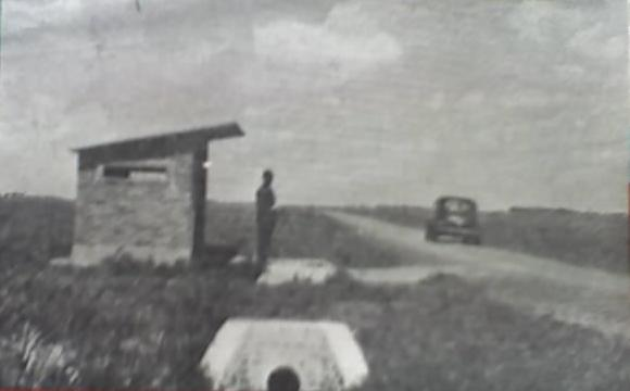 Primeros pobladores de la ciudad Parque San Martín, Merlo, provincia de Buenos Aires.